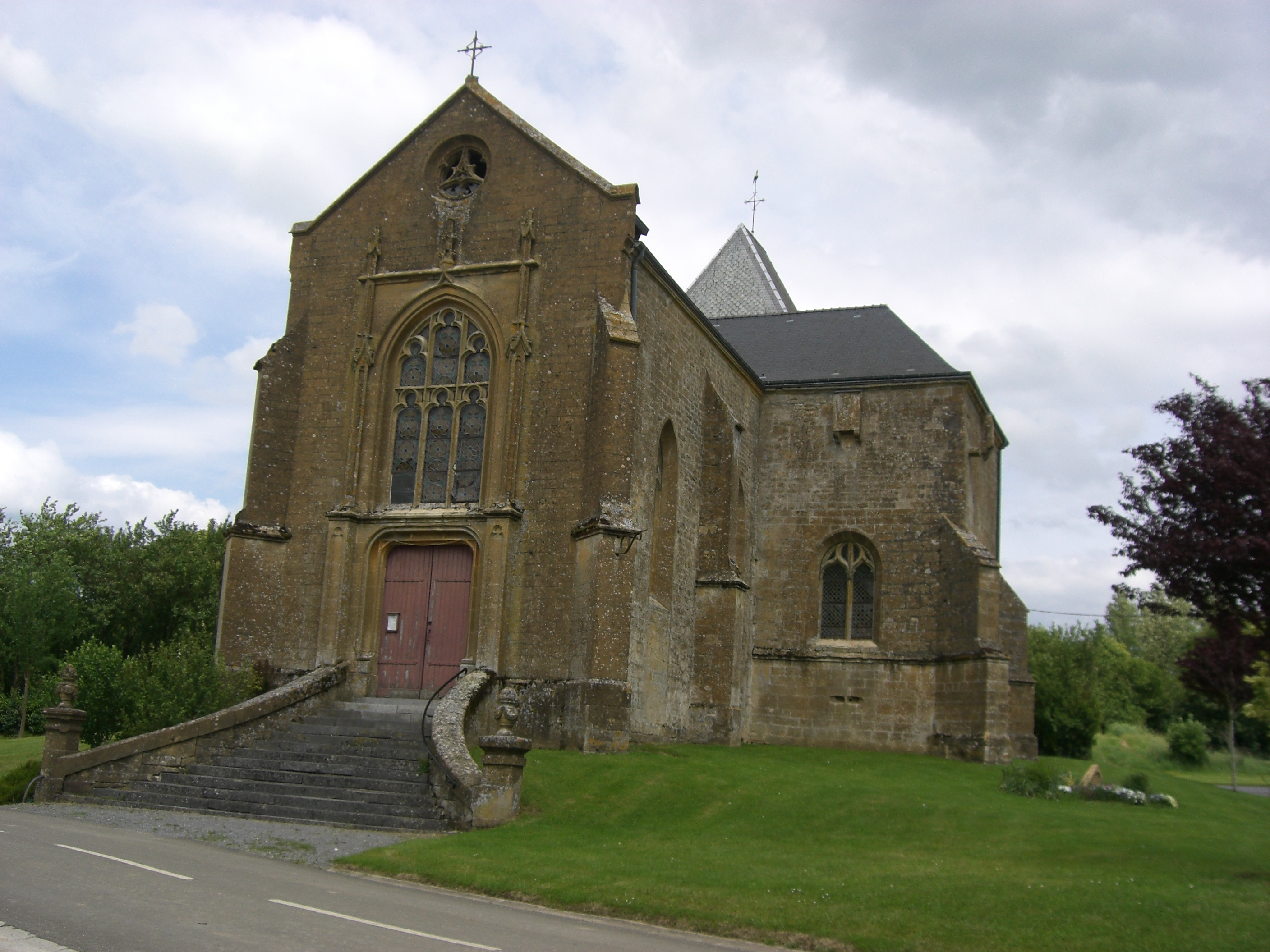 Eglise d'Autruche (Ardennes, France)